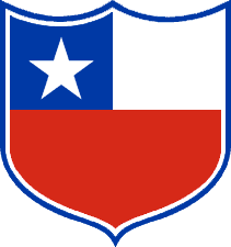 Escudo distintivo del campeón de la Primera División de Chile.